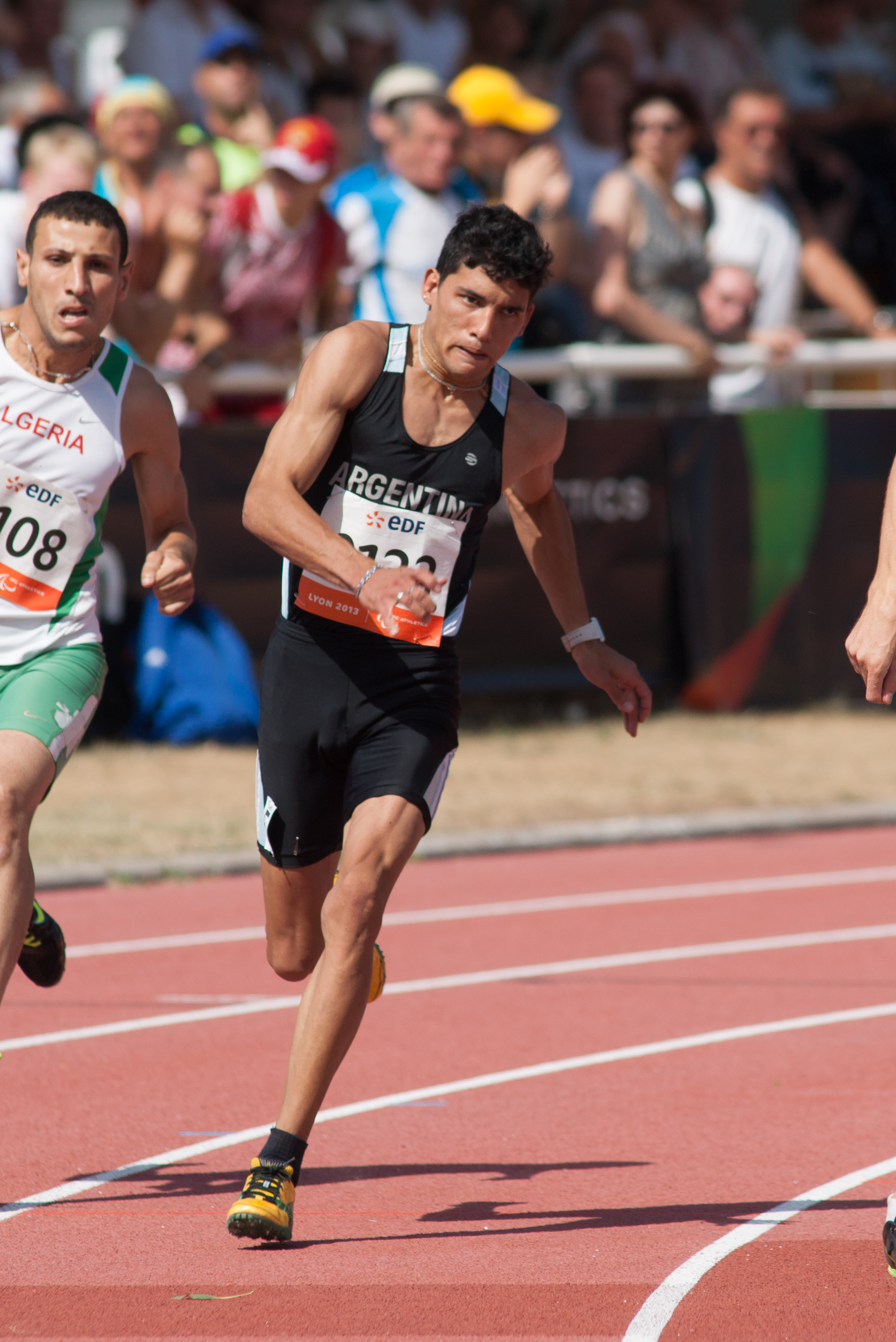 Championnats du monde d'athlétisme IPC 2013. 200 mètres masculin T35.